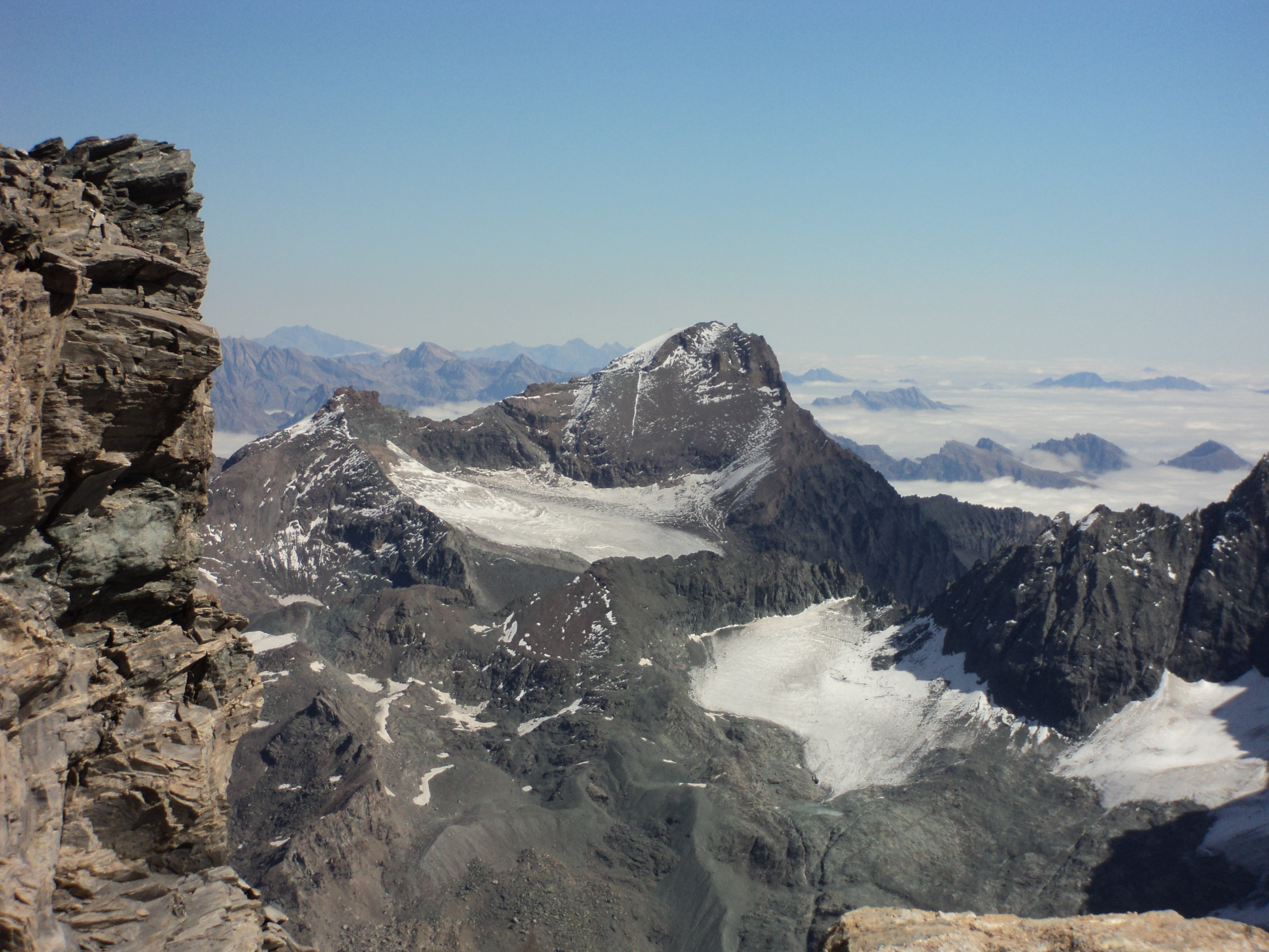 L'Uia di Ciamarella vista dalla Pointe de Charbonnel (versante ovest).